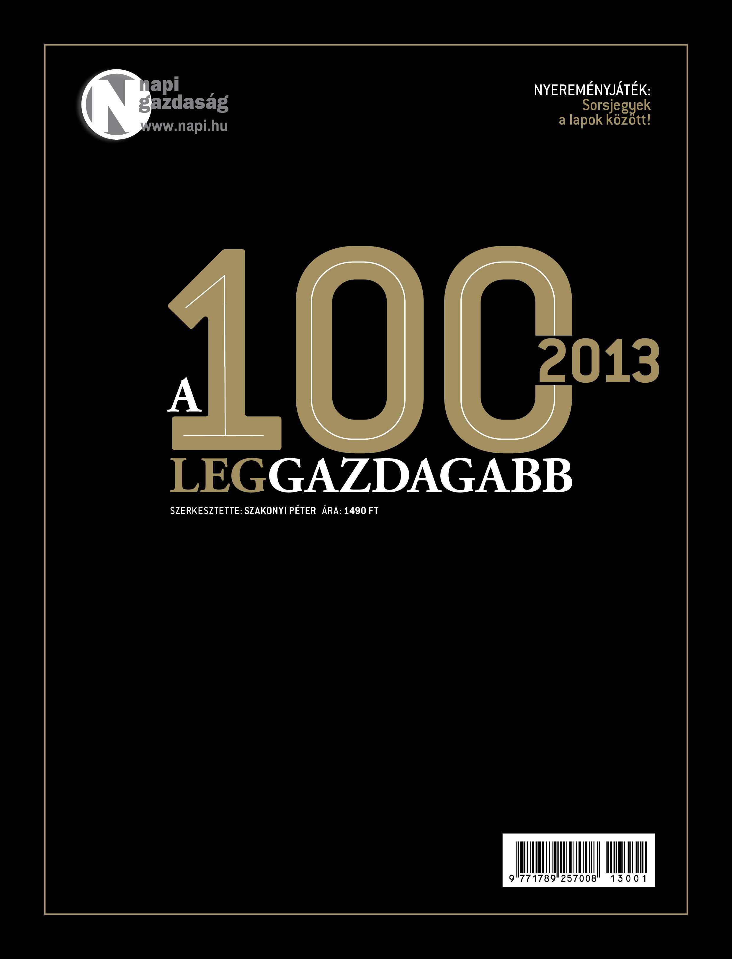 A 100 leggazdagabb 2013 című könyv címlapja